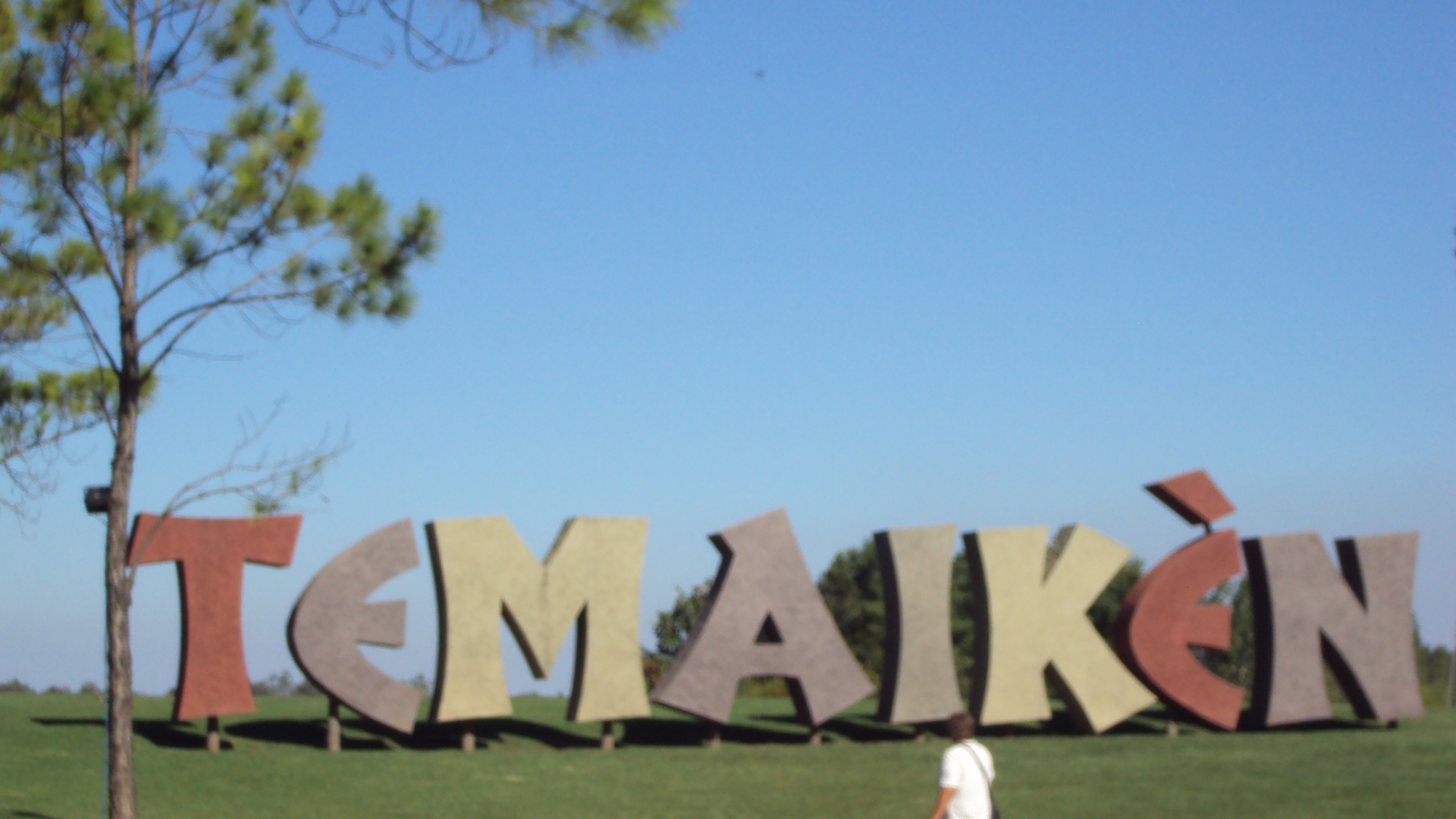 Cartel a la entrada del Parque Zoológico Temaikén, en Buenos Aires.